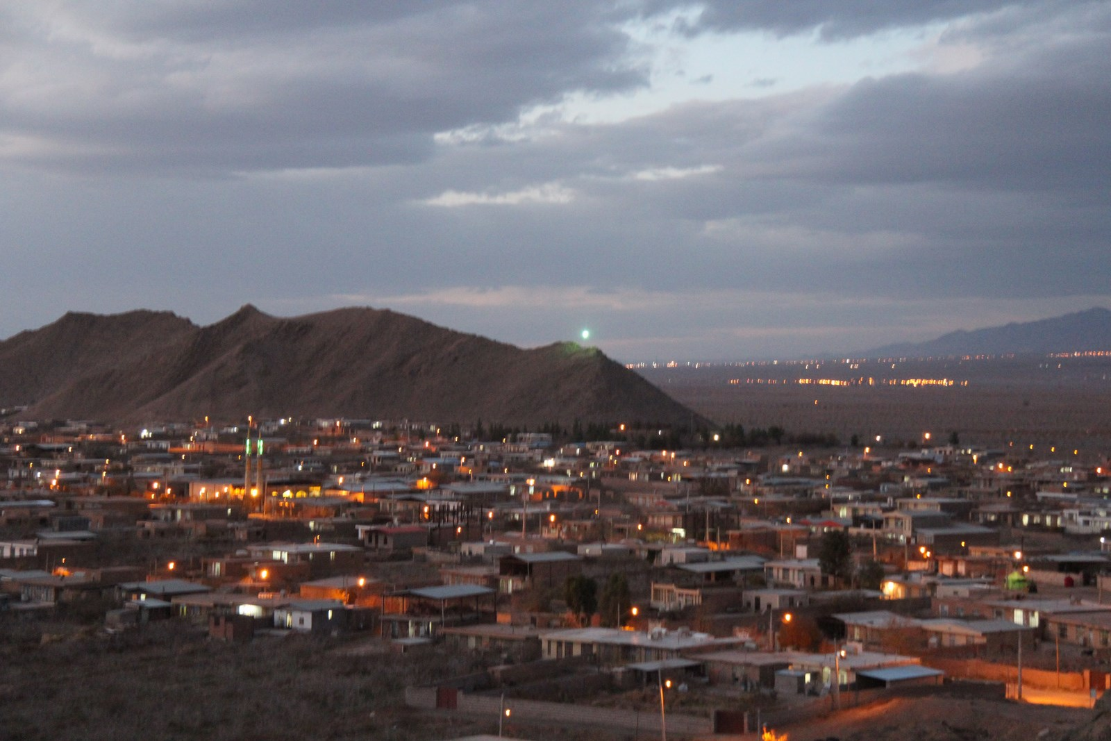 این عکس یک نمای کلی از روستای رحیم آباد است که توسط مجید رحیم آبادی در سال 1392 شمسی گرفته شده است.